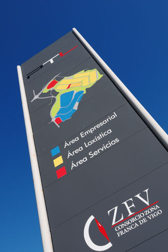 Poste de entrada en el Parque Tecnológico de Vigo